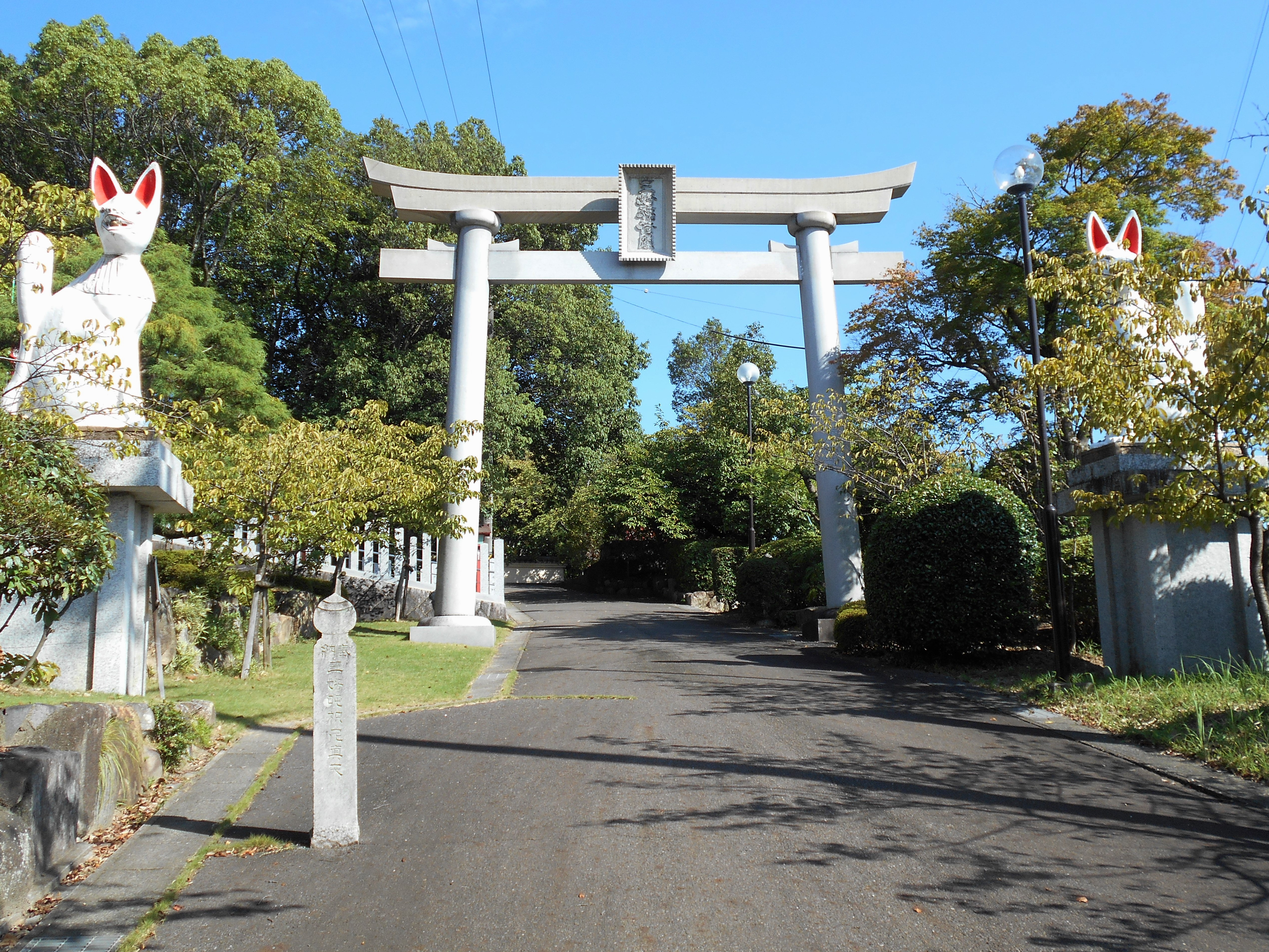 三好稲荷閣 鳥居（愛知県みよし市、2016年8月）